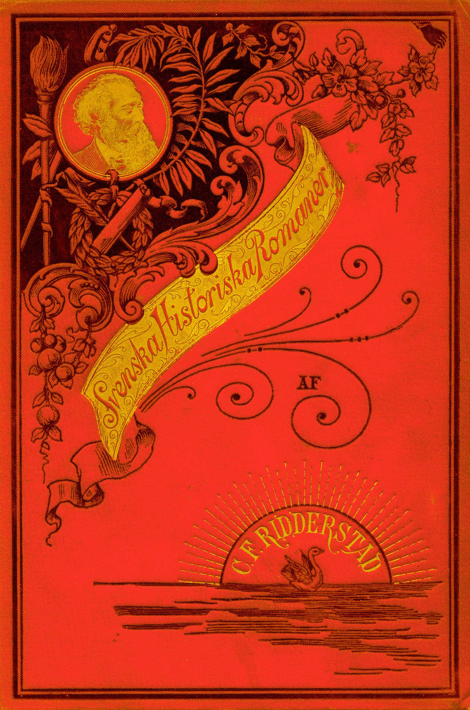 Binding cover: Svenska historiska romaner af C.F. Rioddrerstad: Drabanten